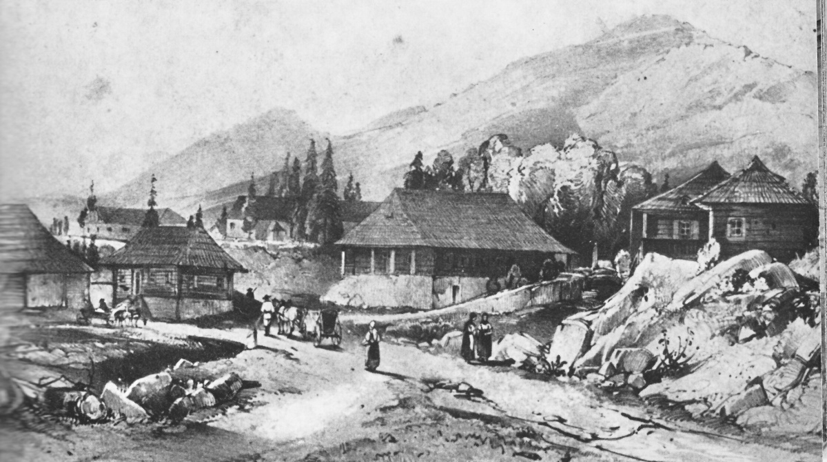 Začiatky Starého Smokovca